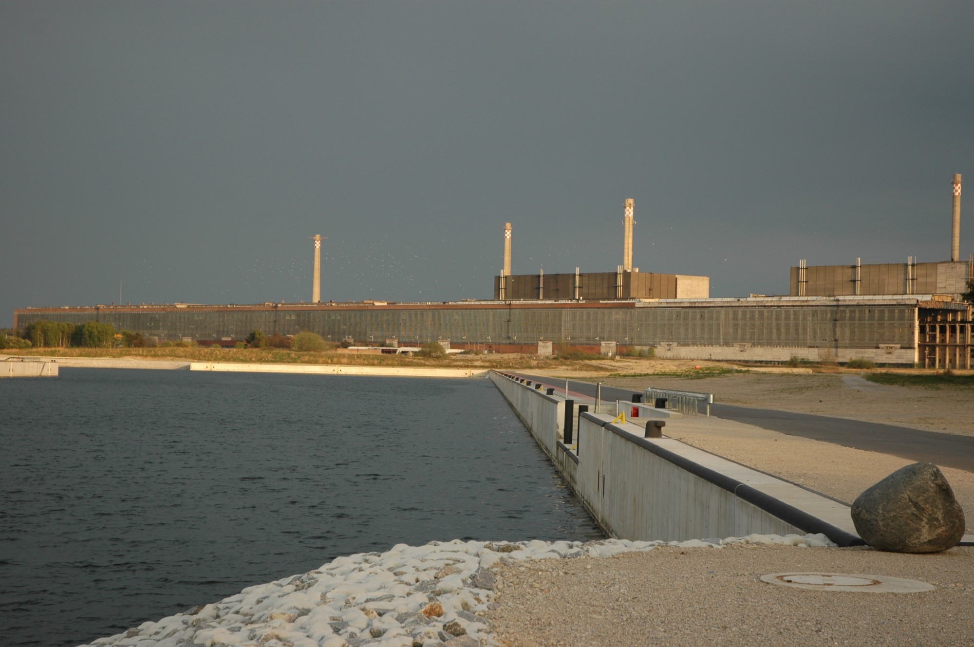 Industriehafen Lubmin (Fertigstellung 2004) und ehemaliges Kernkraftwerk Greifswald (1989 stillgelegt) fotografiert von Harald 14:40, 23. Mai 2005 (CEST) im Mai 2005 GNU-FDL